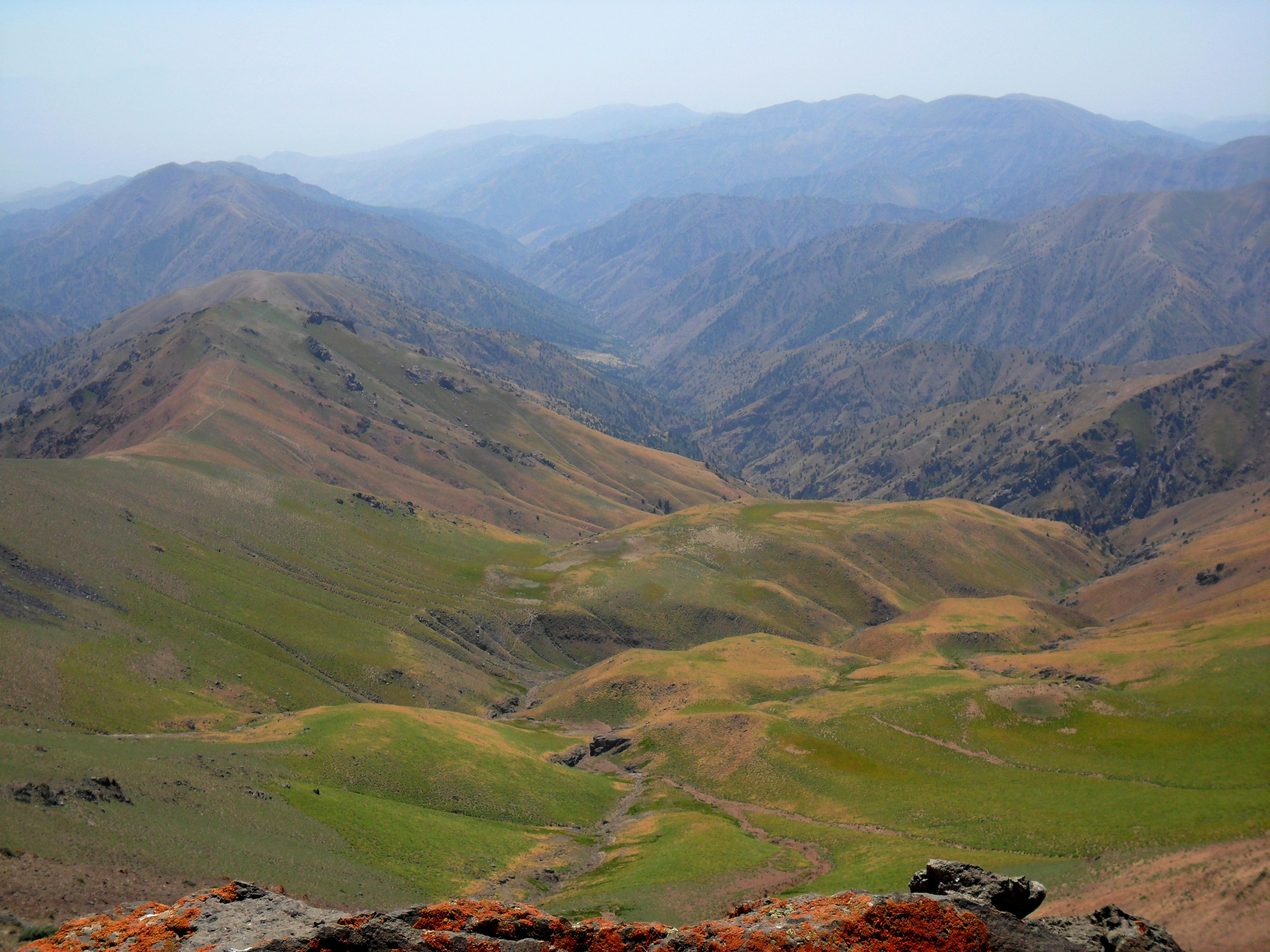 Верховья сая Кальтабаран (одна из составляющих Карабау). На заднем плане долина Карабау. Вид с Чаткальского хребта (гора Реваш). Ташкентская область, Республика Узбекистан